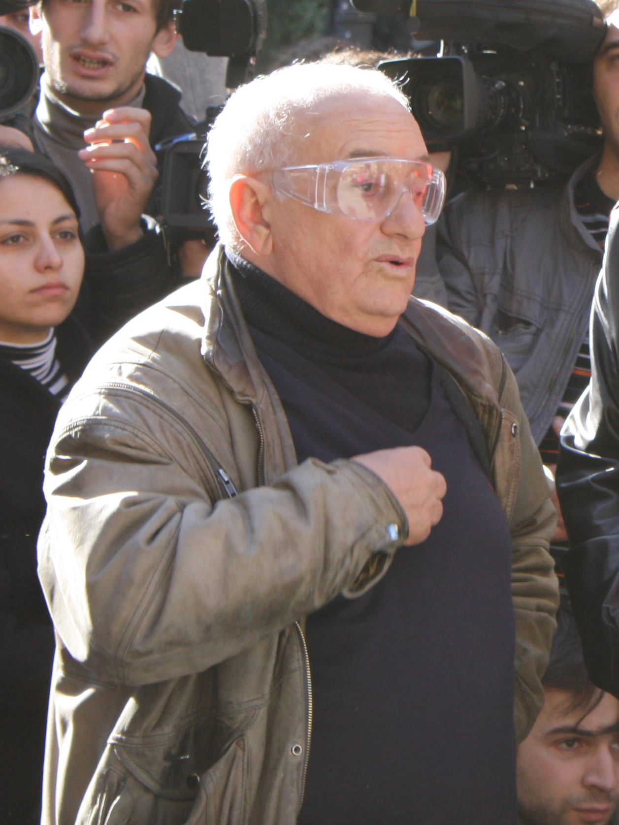 Резо Габраидзе, 2010 год